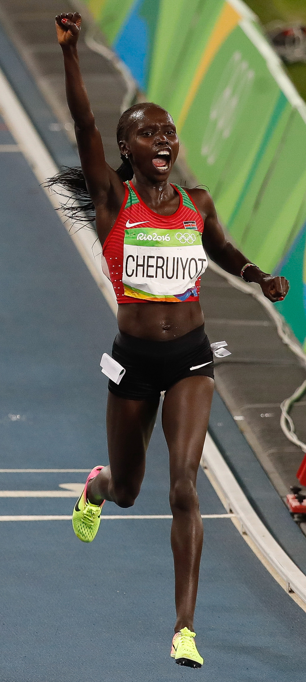 Rio de Janeiro - A queniana Vivian Jepkemoi Cheruiyot vence final e bate recorde olímpico dos 5 mil metros nos Jogos Rio 2016, no Estádio Olímpico (Fernando Frazão/Agência Brasil)